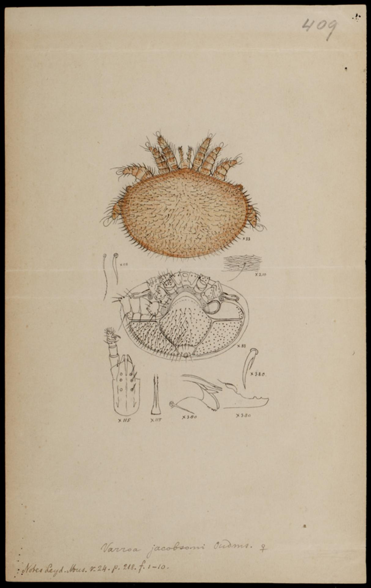 Varroa jacobsoni (Oudemans)Notes Leyd. Mus. v. 24 (1902-1904) p. 218 fol. 1-10 at